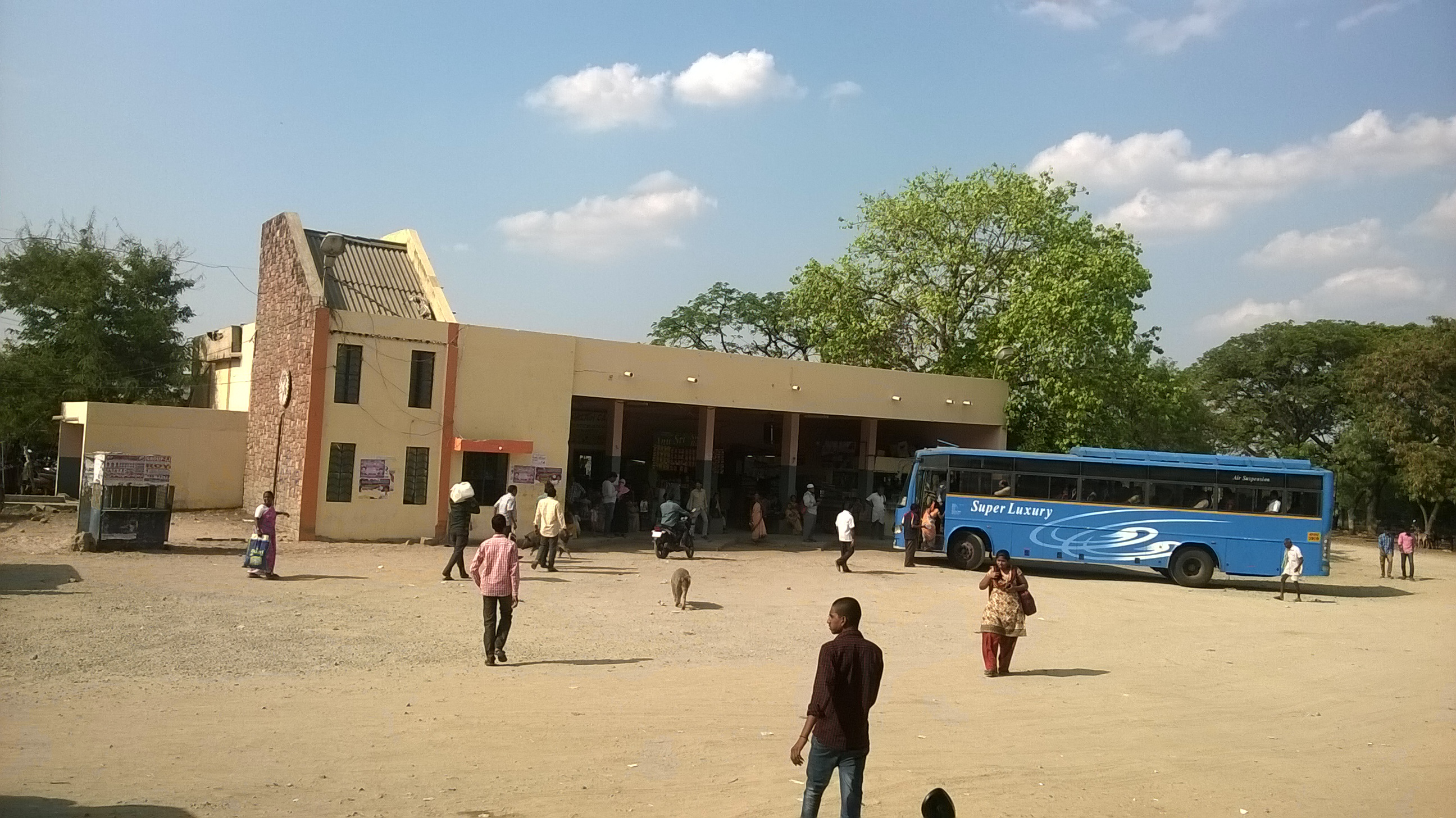 బస్సు నిలయం, కొత్తకోట